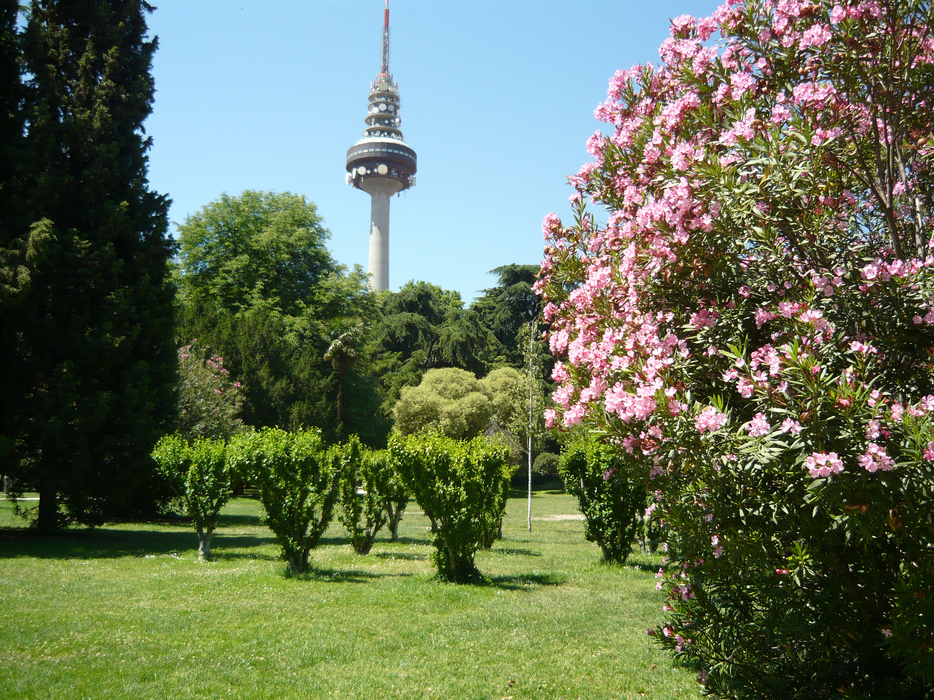 Vista del Parque de la Fuente del Berro, Madrid, España.